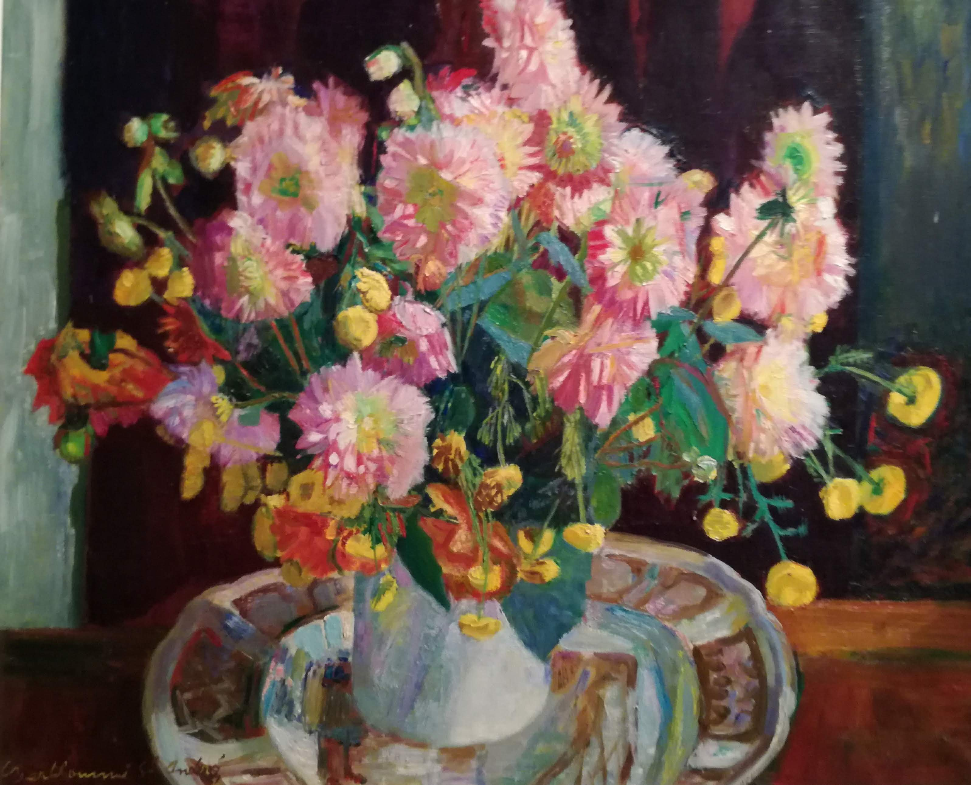 Nature morte non datée de Louis Berthommé Saint-André donnée aux musées de Saintes en 2018